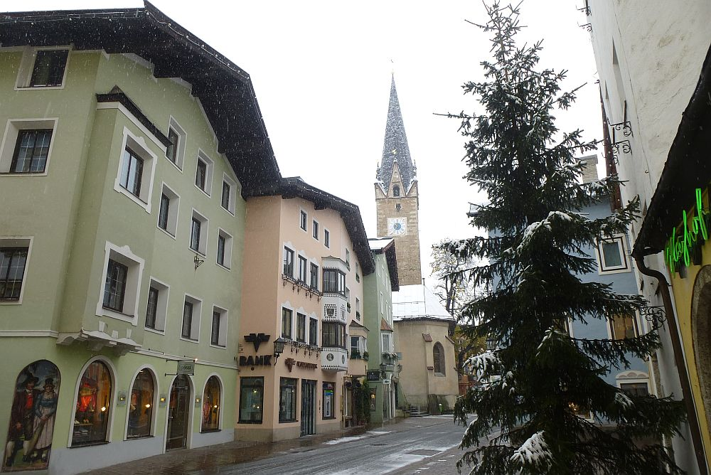 Kitzbühel im Winter